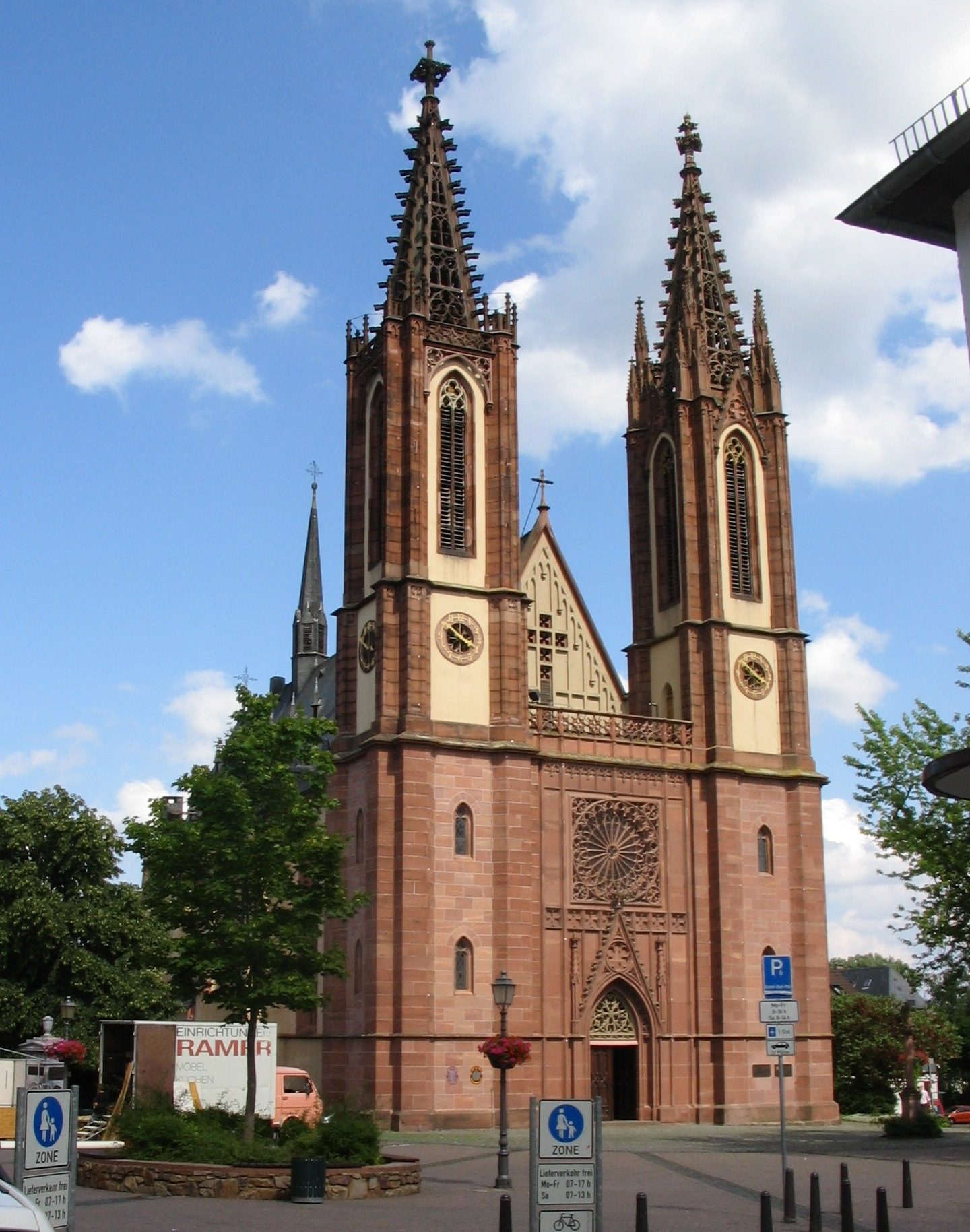 Die katholische Pfarrkirche Hl. Kreuz in Geisenheim hat als einzige Kirche im Rheingau zwei Türme und wird deshalb auch Rheingauer Dom genannt. Ansicht von Westen mit Bischof-Blum-Platz